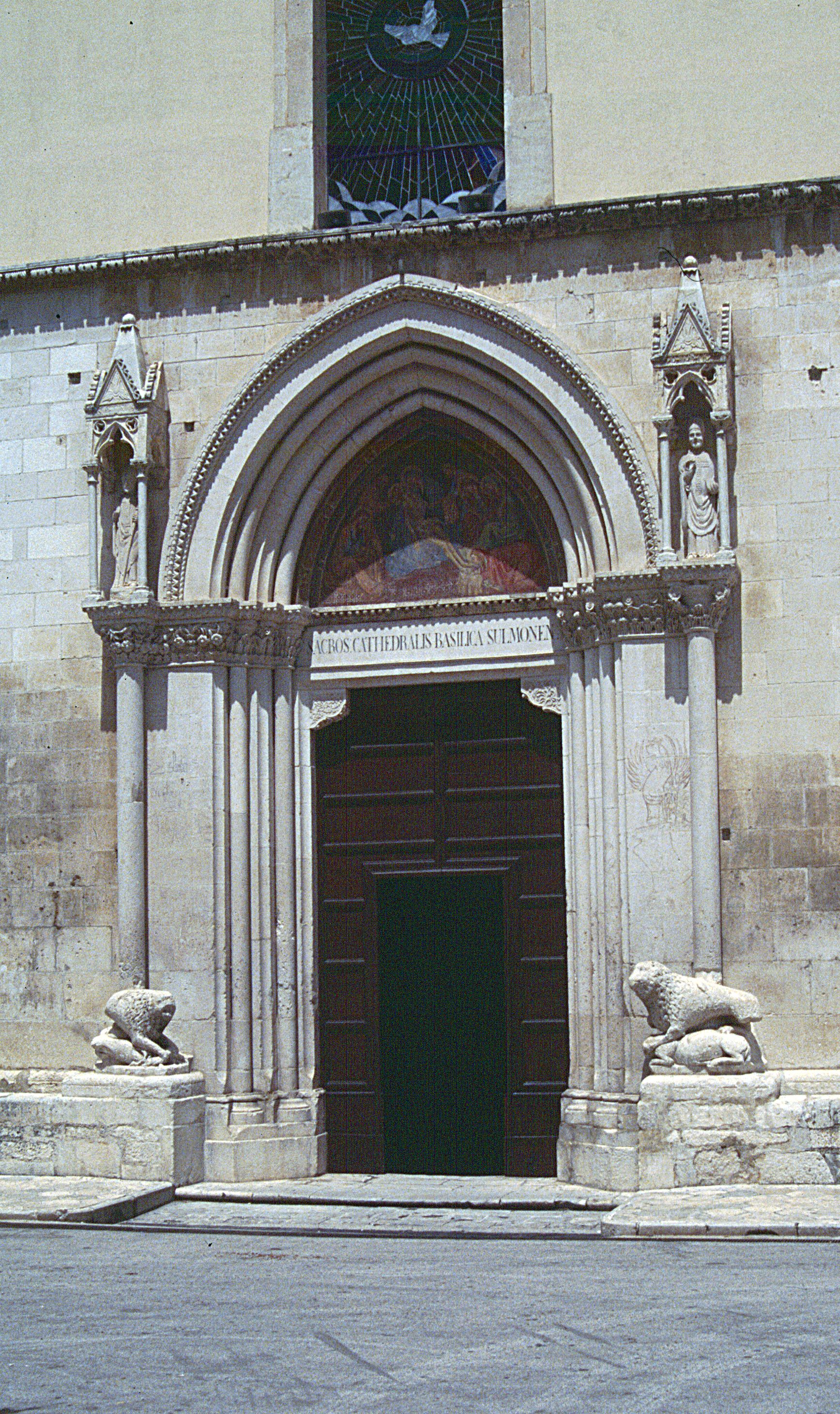 Sulmona: Catedrale di San Panfilo